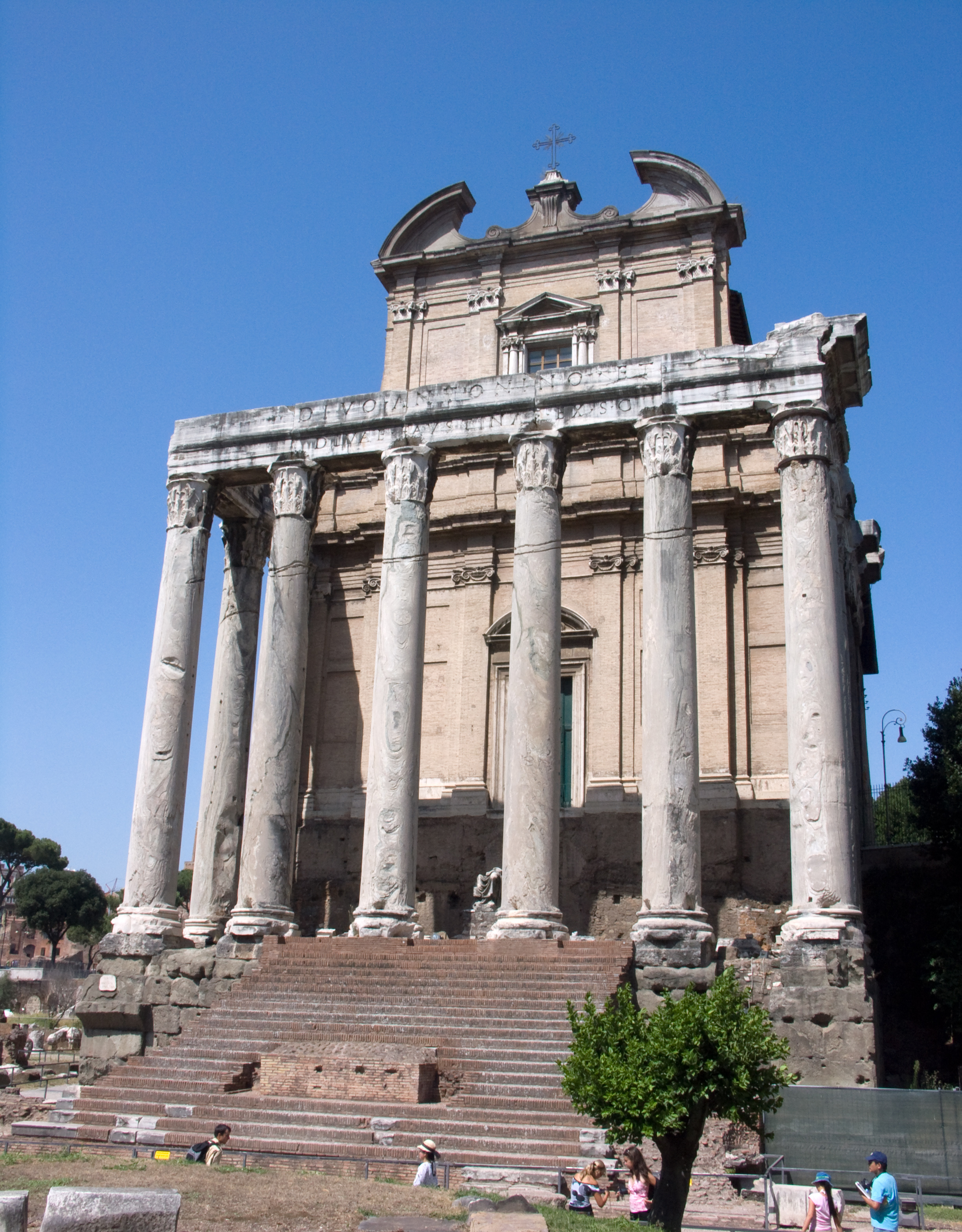 Rome, Forum romain, Temple d'Antonin et Faustine